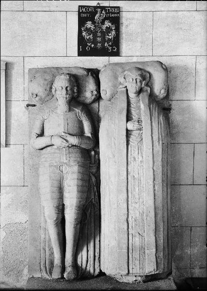 Gravmonument över Jakob Trelo och Margareta Slotz, 1600-talet. Kategori: (09) Gravar Gravmonument över Jakob Trelo och Margareta Slotz, 1600-talet.